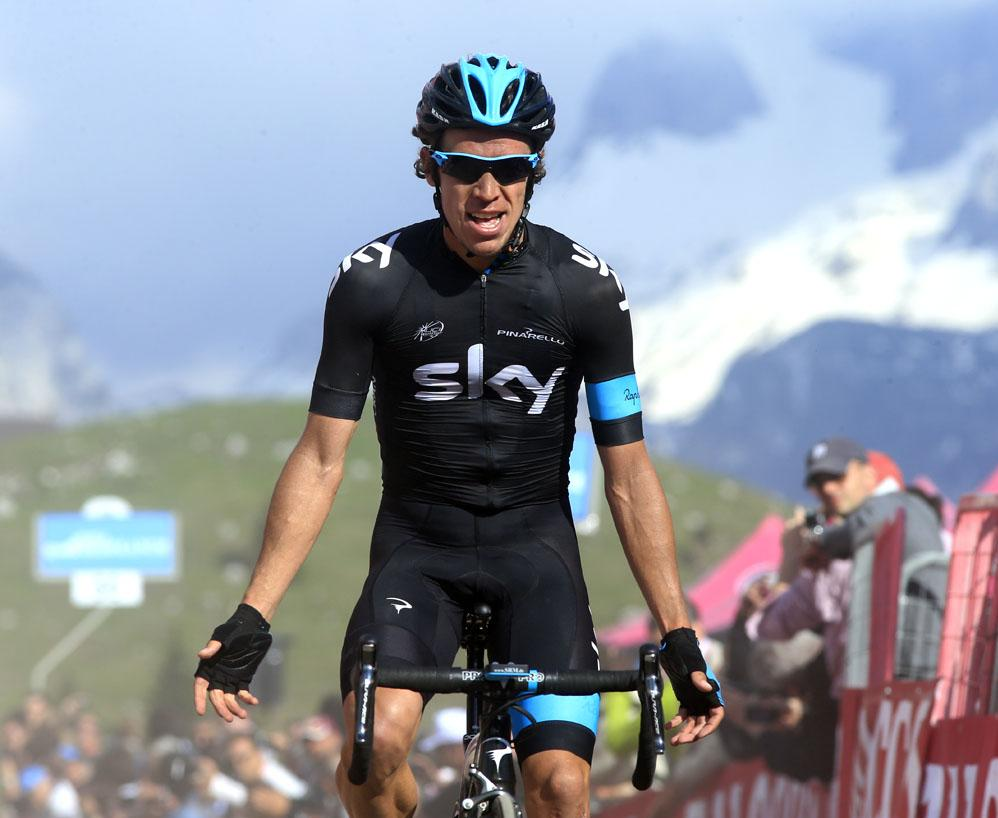 Rigoberto Urán gana en la etapa diez en el Giro d'Italia 2013